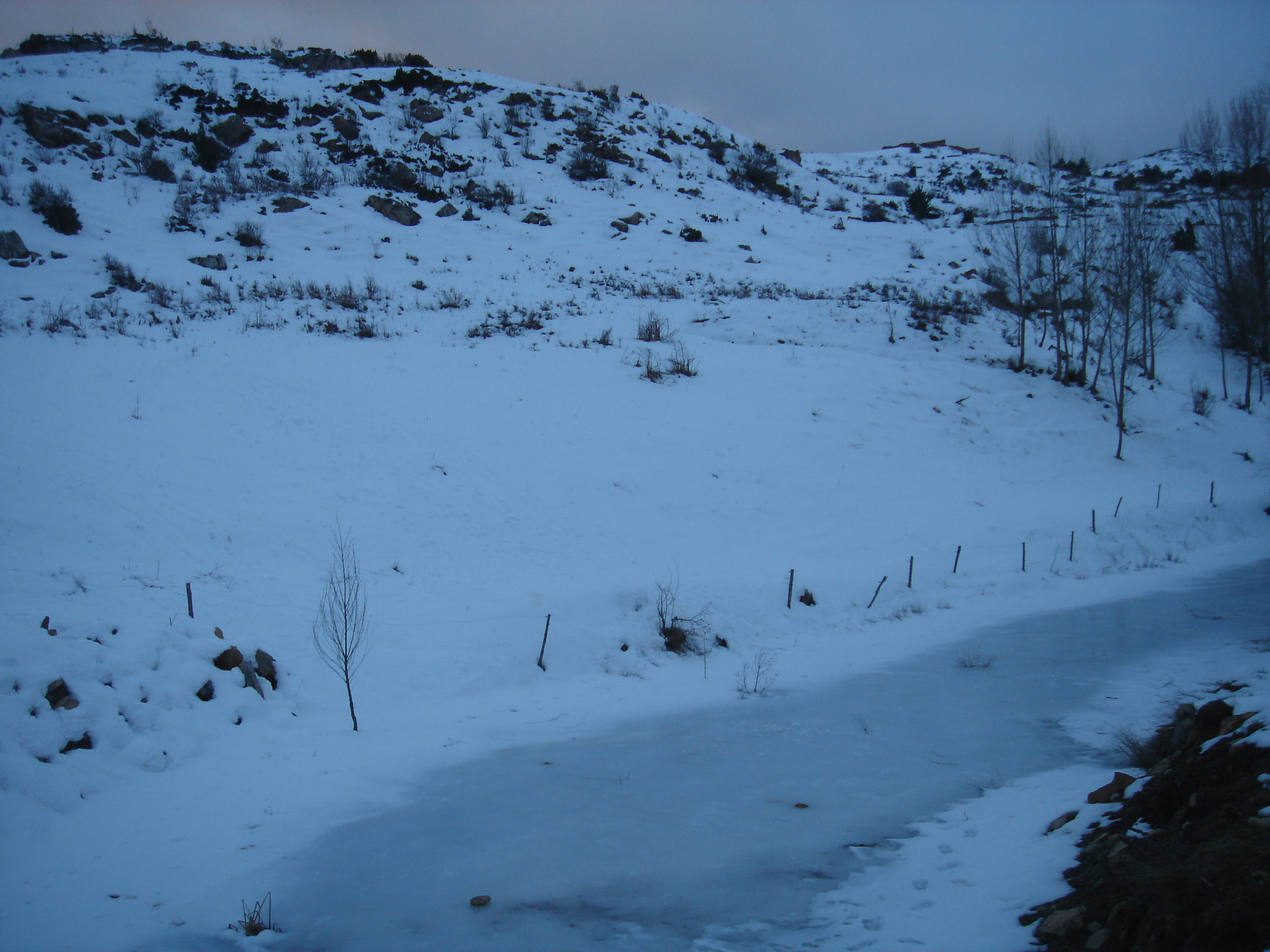 Río Linares helado